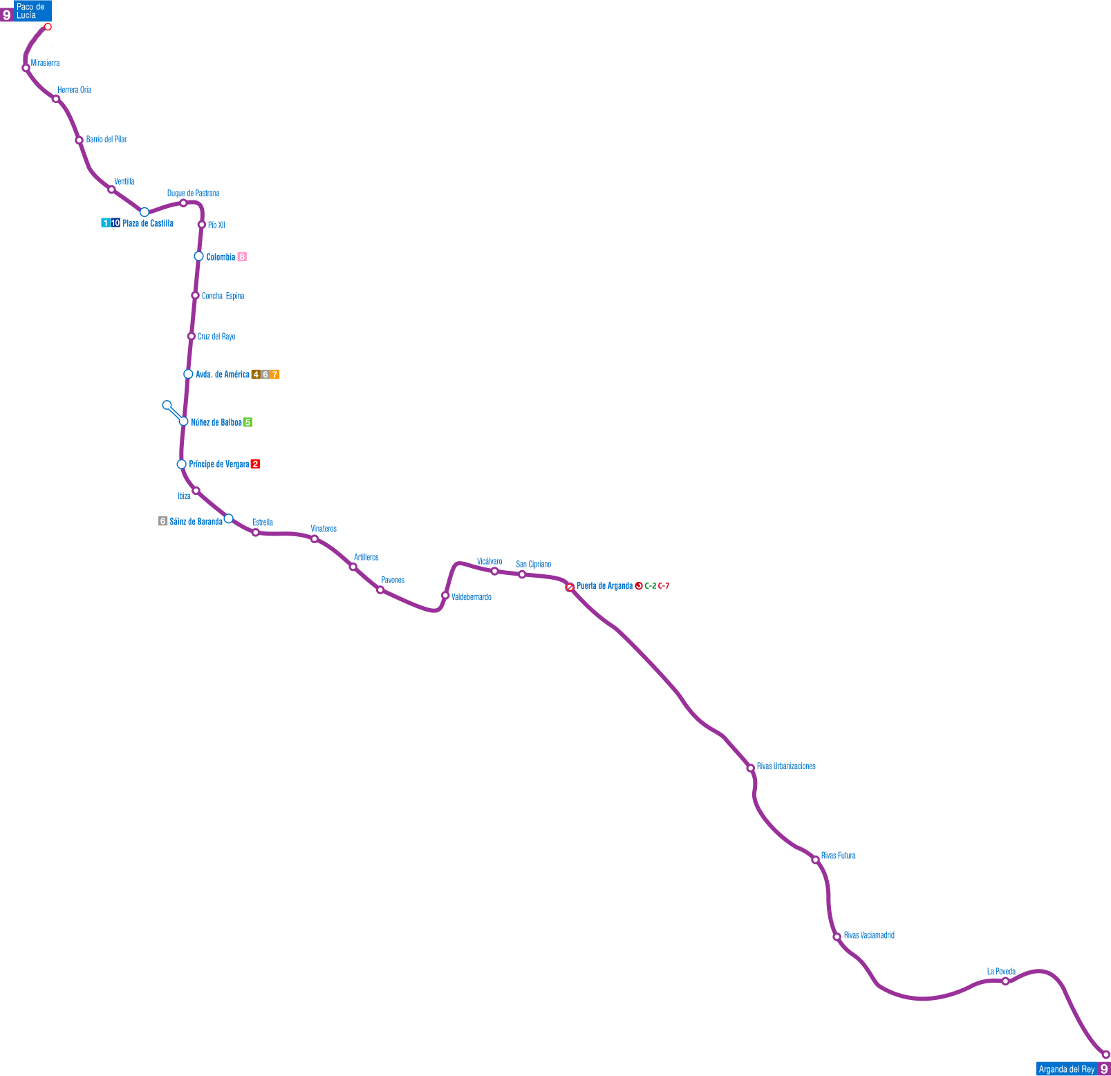 Recorrido de la línea 9 del Metro de Madrid